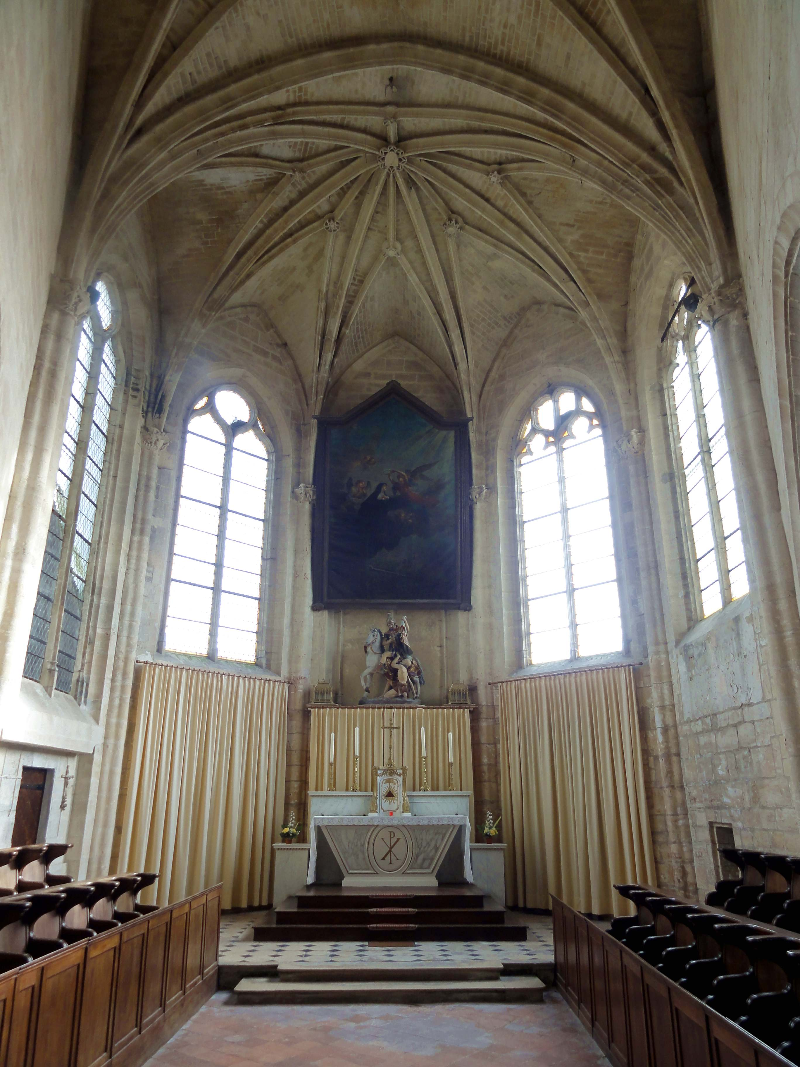 Voir titre.